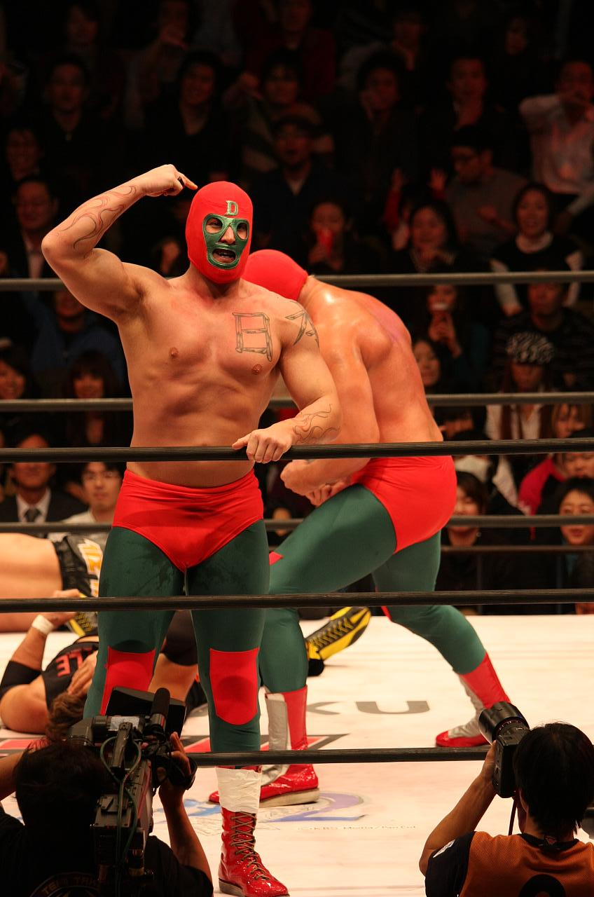 Dina Sharp (Rene Goguen